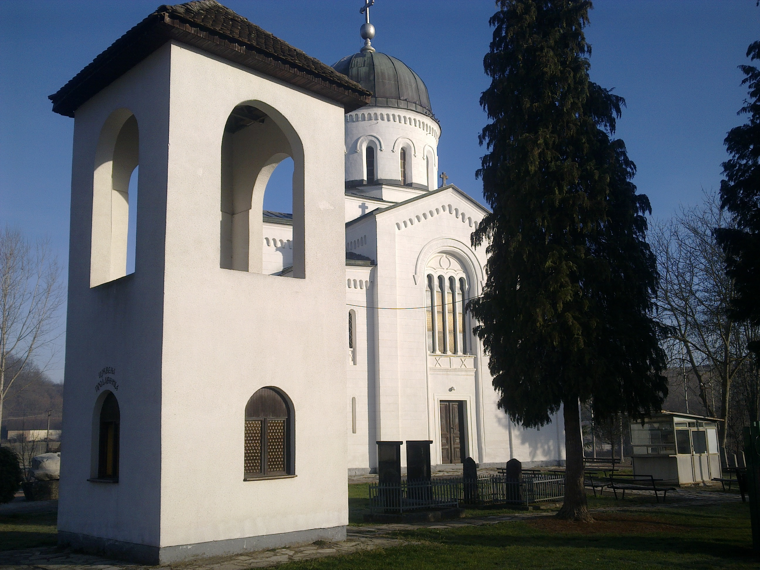 Bela Crkva